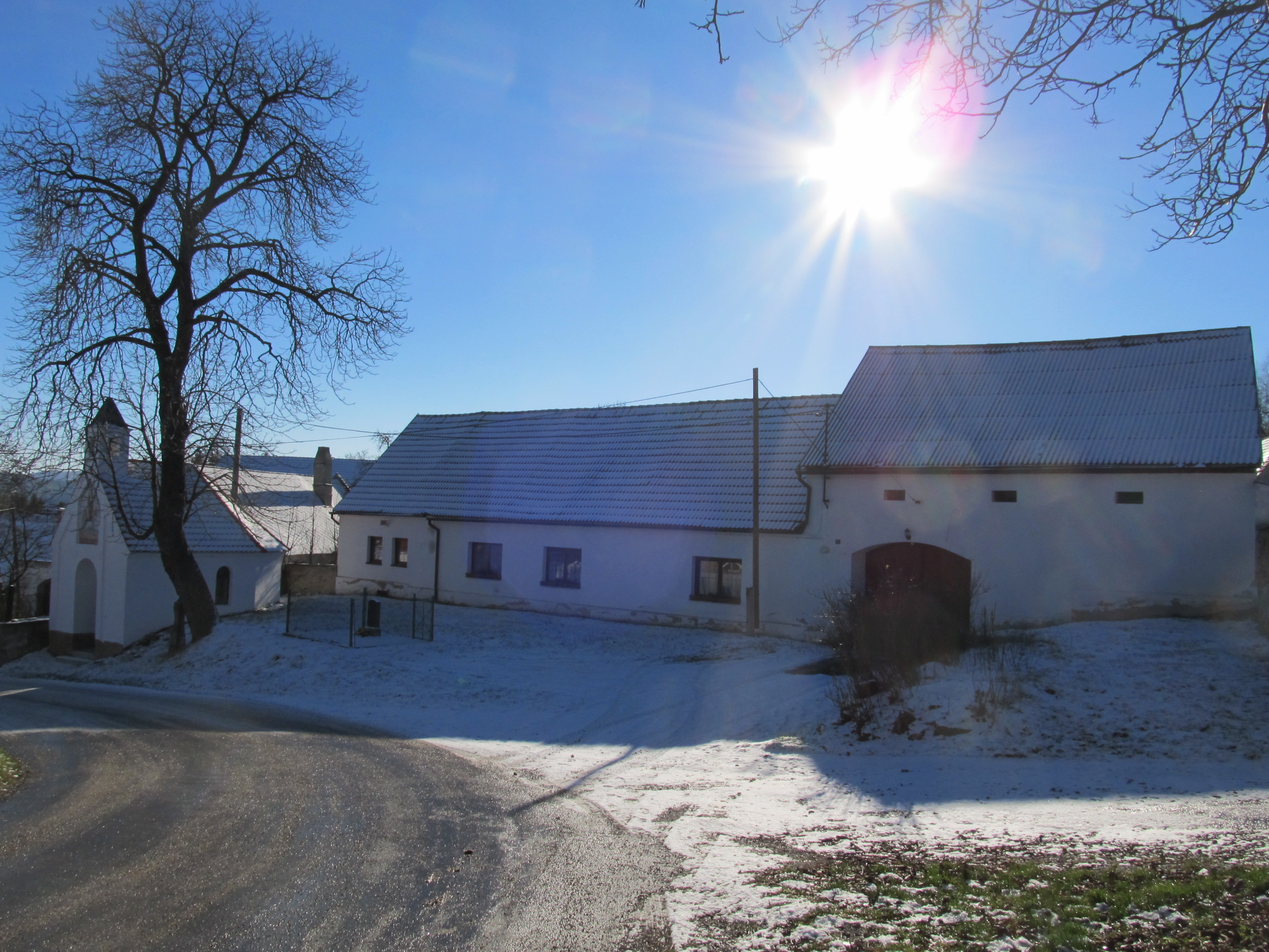 Chocholatá Lhota - náves